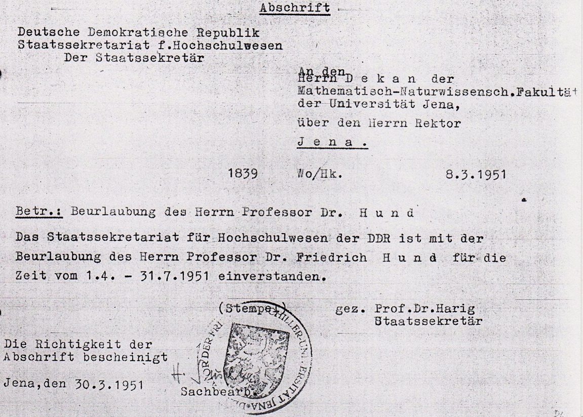 Kopie eines Schreibens von Gerhard Harig, Staatssekretär der DDR für das Hochschulwesen, die Beurlaubung von Friedrich Hund vom 1. April bis 31. Juli 1951 betreffend.